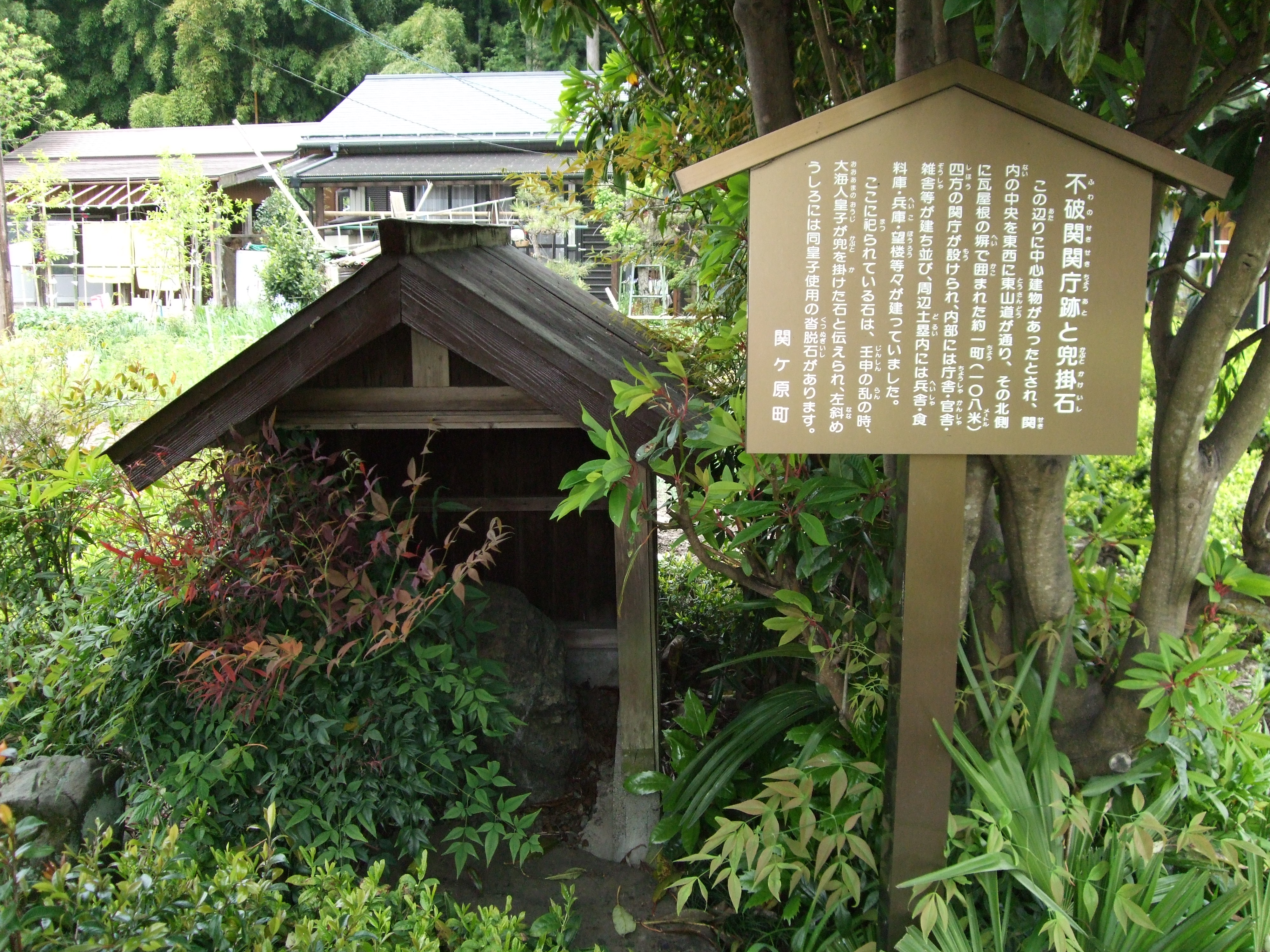 Kabuto Kake Stone at Jinshin-no-ran